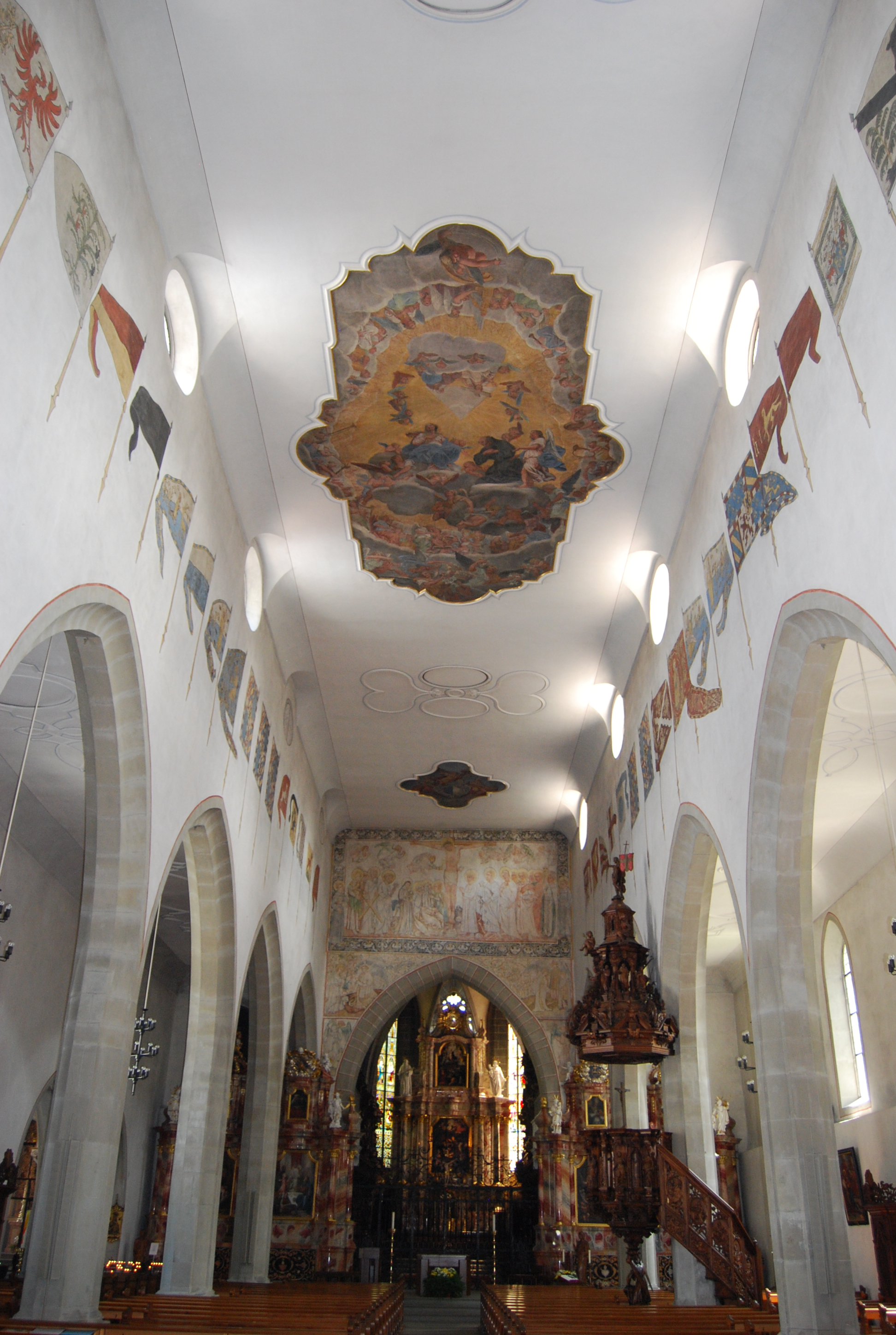 Innenansicht der ehem. Barfüsserkirche (heute Franziskanerkirche) in Luzern mit den bei Sempach erbeuteten Schlachtbannern